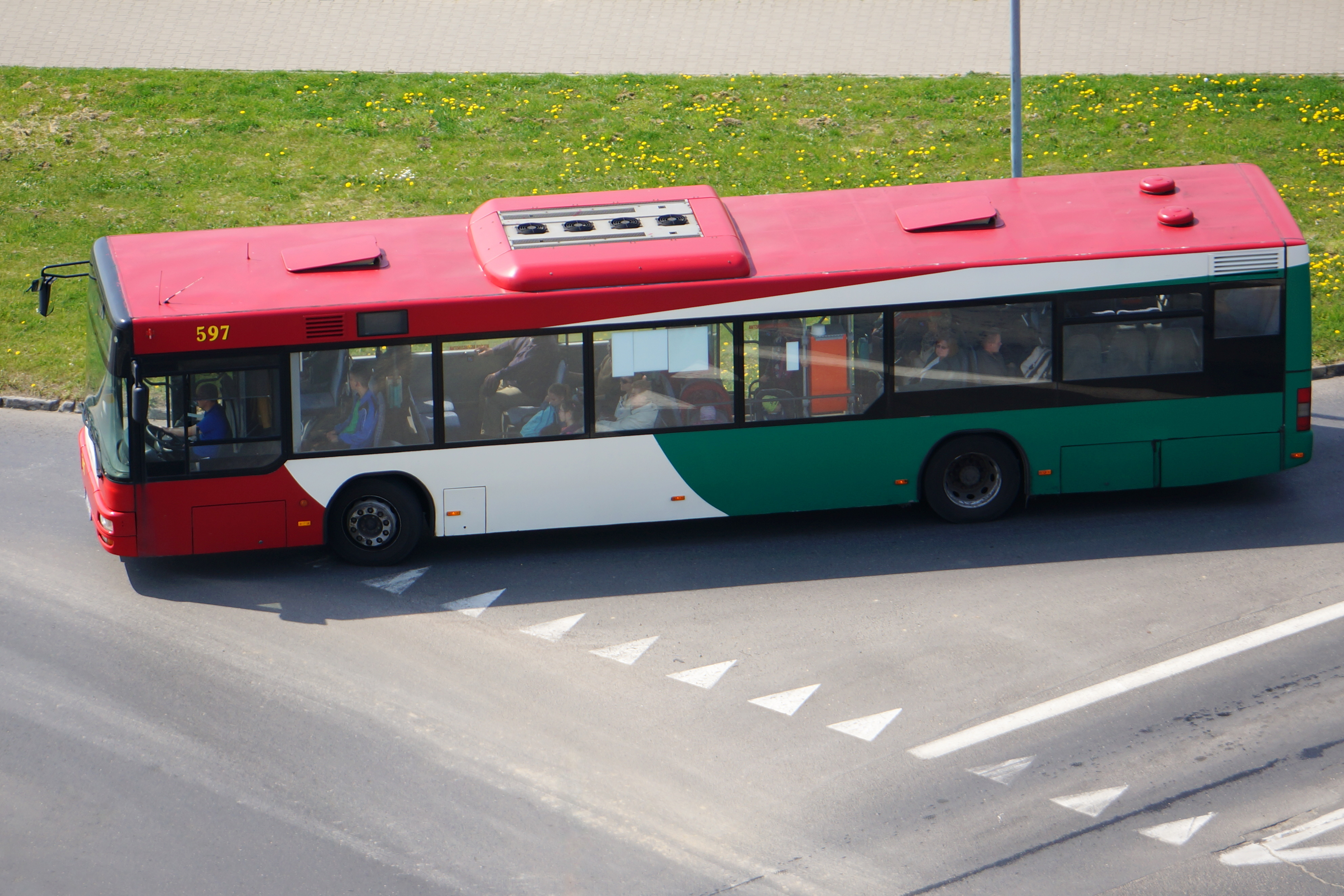 Gorzów Wlkp. Autobus MAN NL 313 w malowaniu wykorzystującym barwy miejskiej flagi.